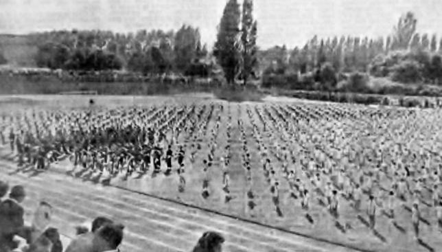 vue d'un lendit en France avant la Guerre de 1914